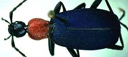 Galerita atripes, male, location: U.S.A.: Arizona: Santa Catalina Mountains